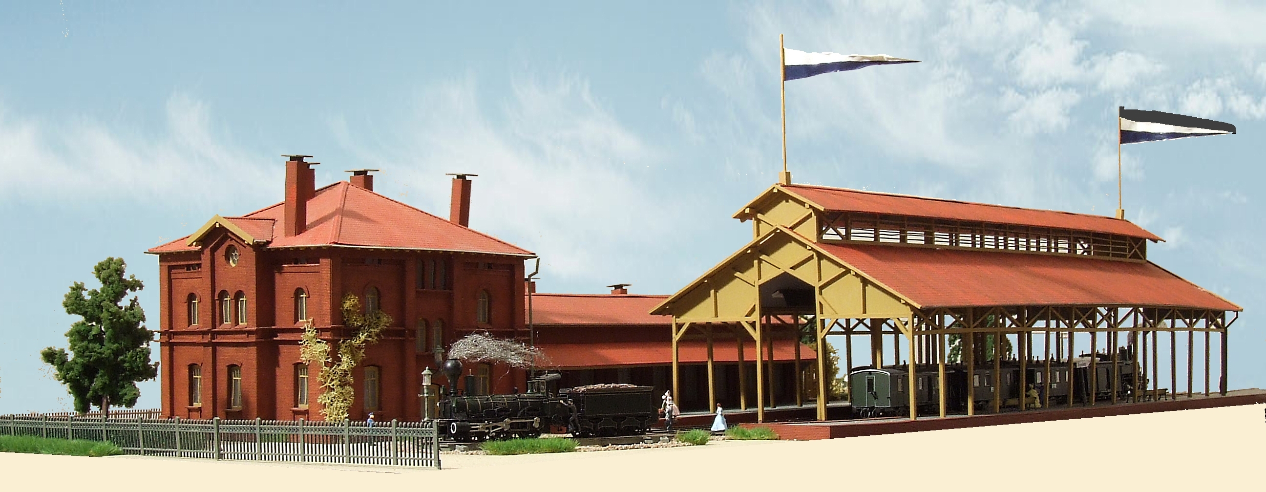 Ansicht Alter Bahnhof Landshut von Südosten - Modell im Maßstab 1:87 - Gebaut 2011 von Thorsten Hambusch, Landshut